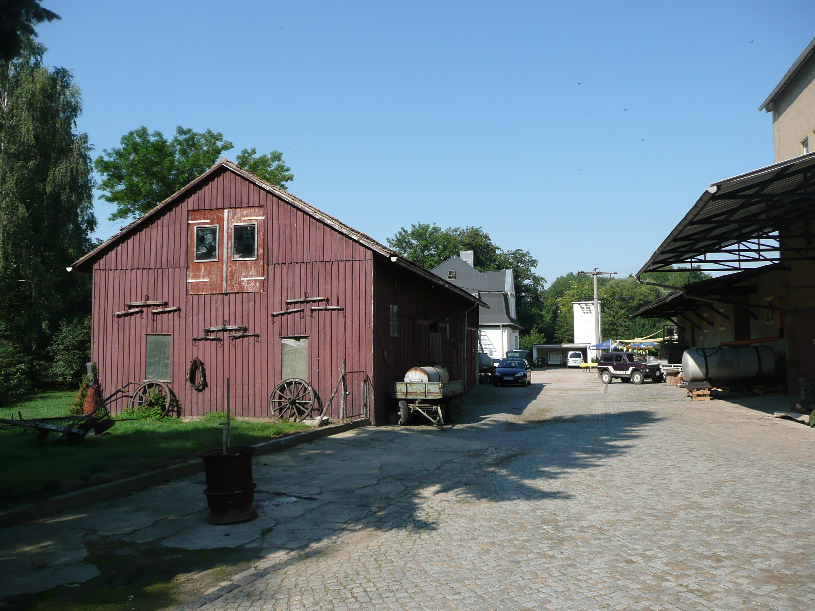 Bahnhofsareal Mochau, Blickrichtung Döbeln